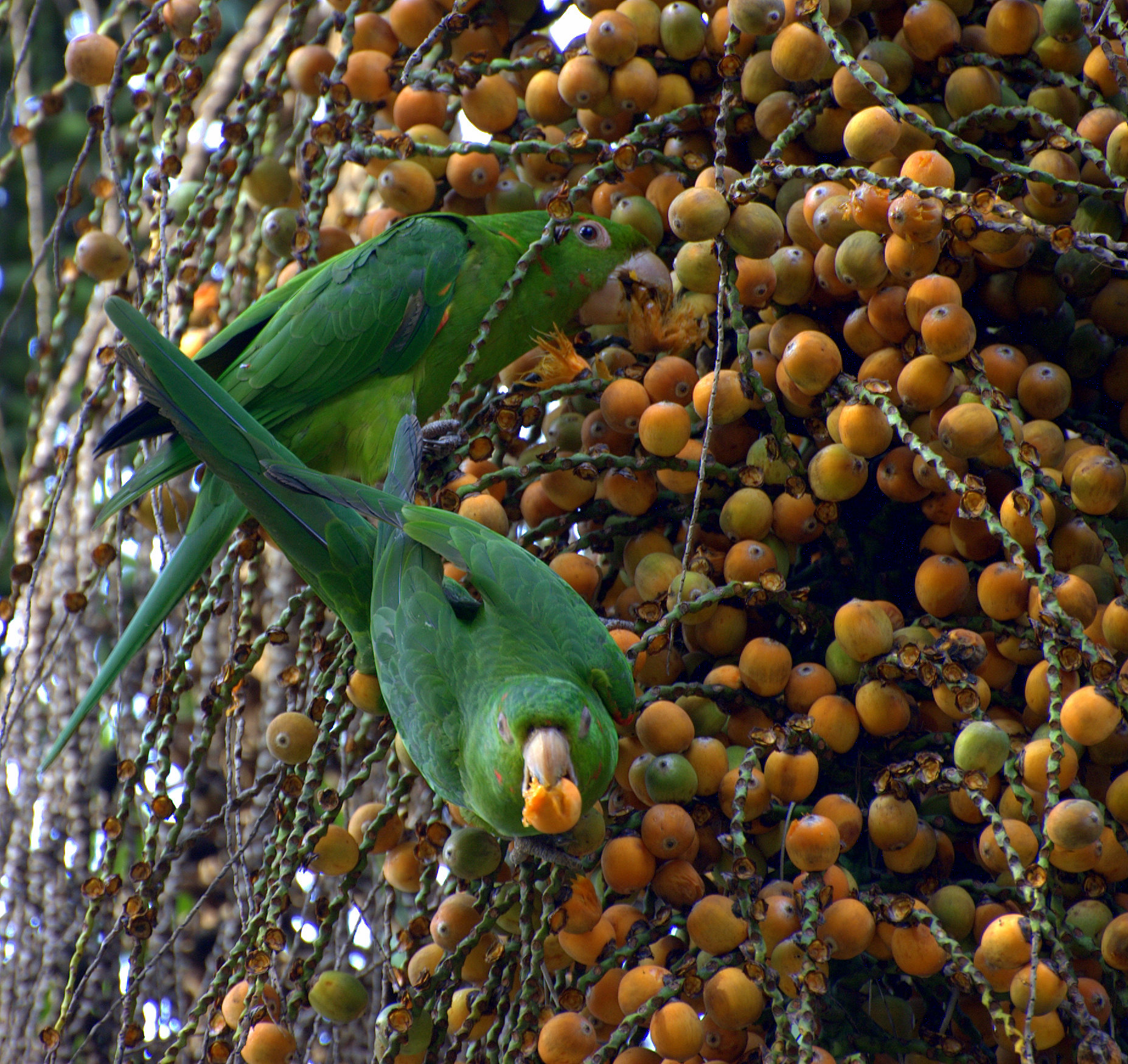 Praça Barão do Rio Branco, Serra Negra-SP